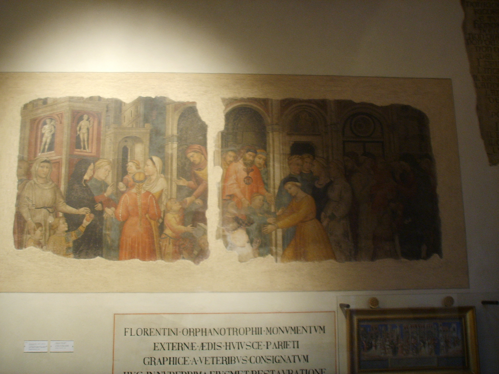 Museo_del_Bigallo,_ Niccolò_di_Pietro_Gerini_e_Ambrogio_di_Baldese,_affreschi_staccati_dalla_loggia_del_bigallo_(1386)